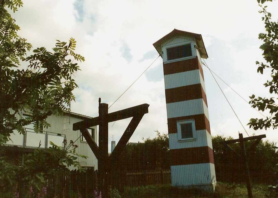 Leuchtturm Hafnarfjarðarviti Hafnarfjörður, Island